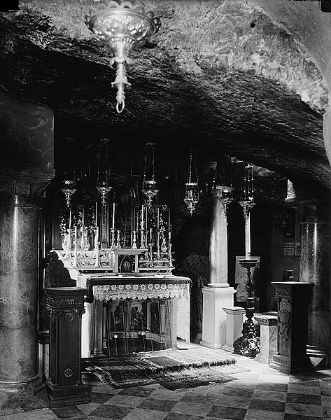 Bethlehem and surroundings. The Milk Grotto . stereograph, dry plate